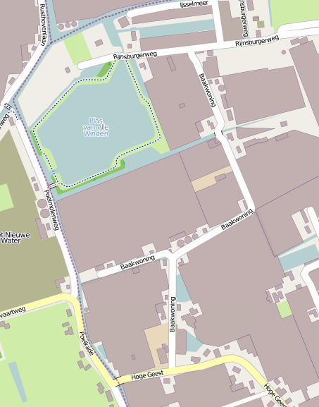 geografische kaart via [1]